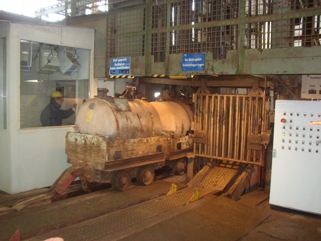 Füllort (oben) des Schachts Konrad beim Verladen von Treibstoffloren.